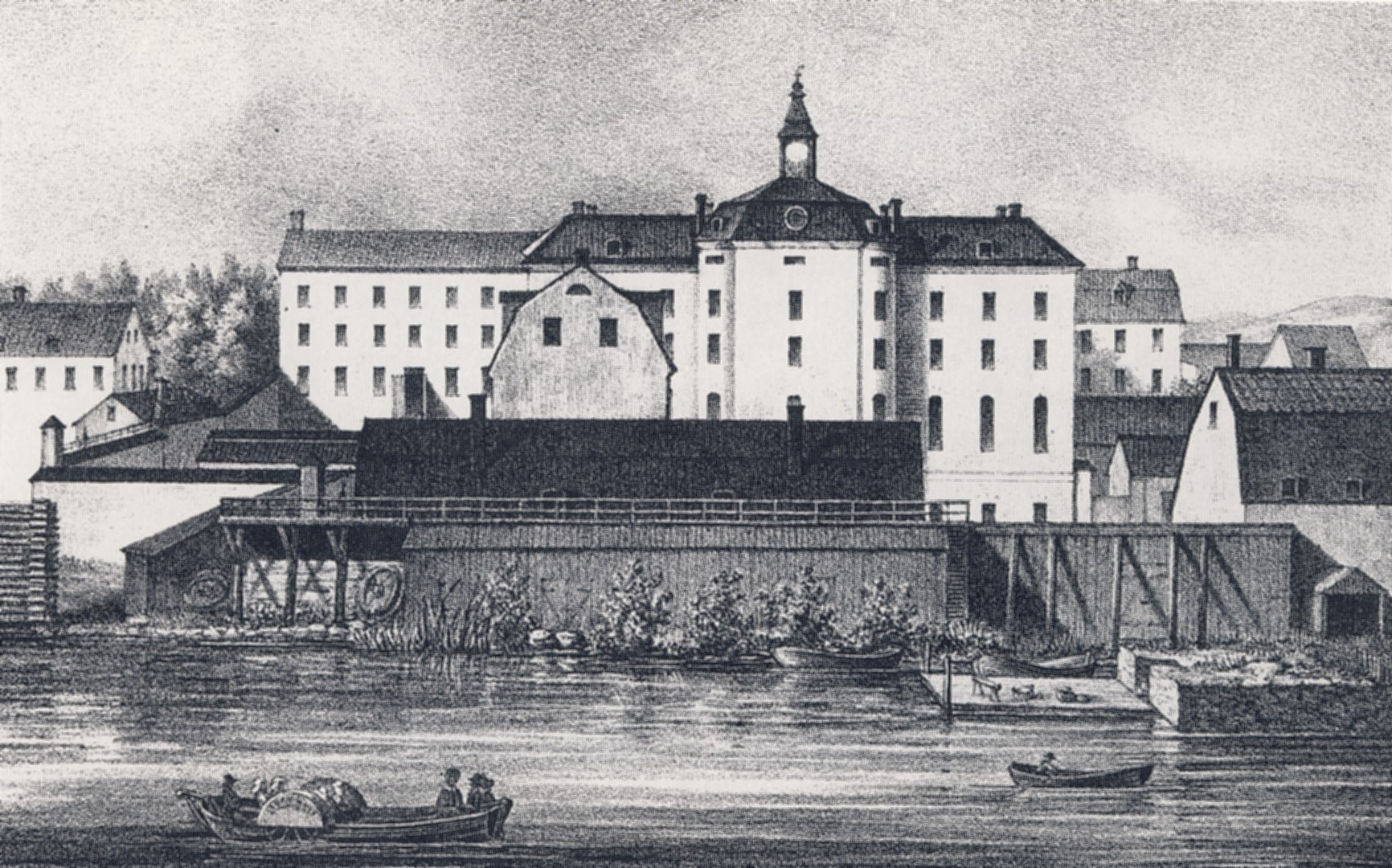 Utsikt mot Spinnhuset på Långholmen i Stockholm. Litografi av Adolf Hård ca 1850.